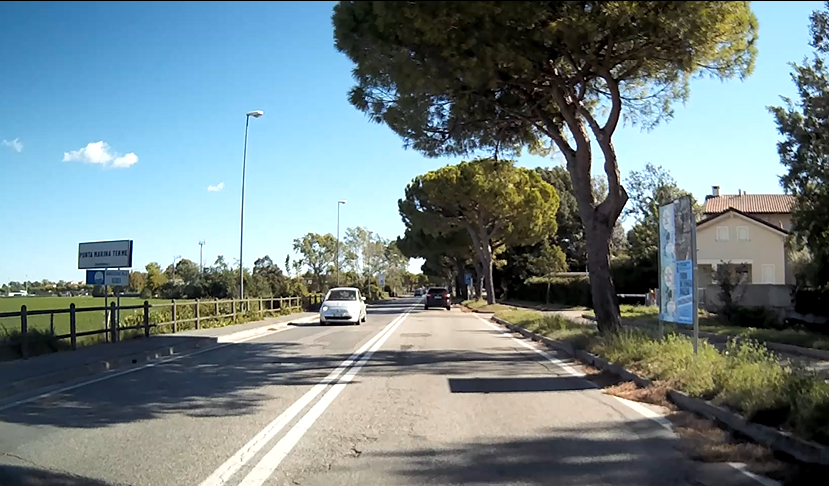 frazione Punta Marina Terme